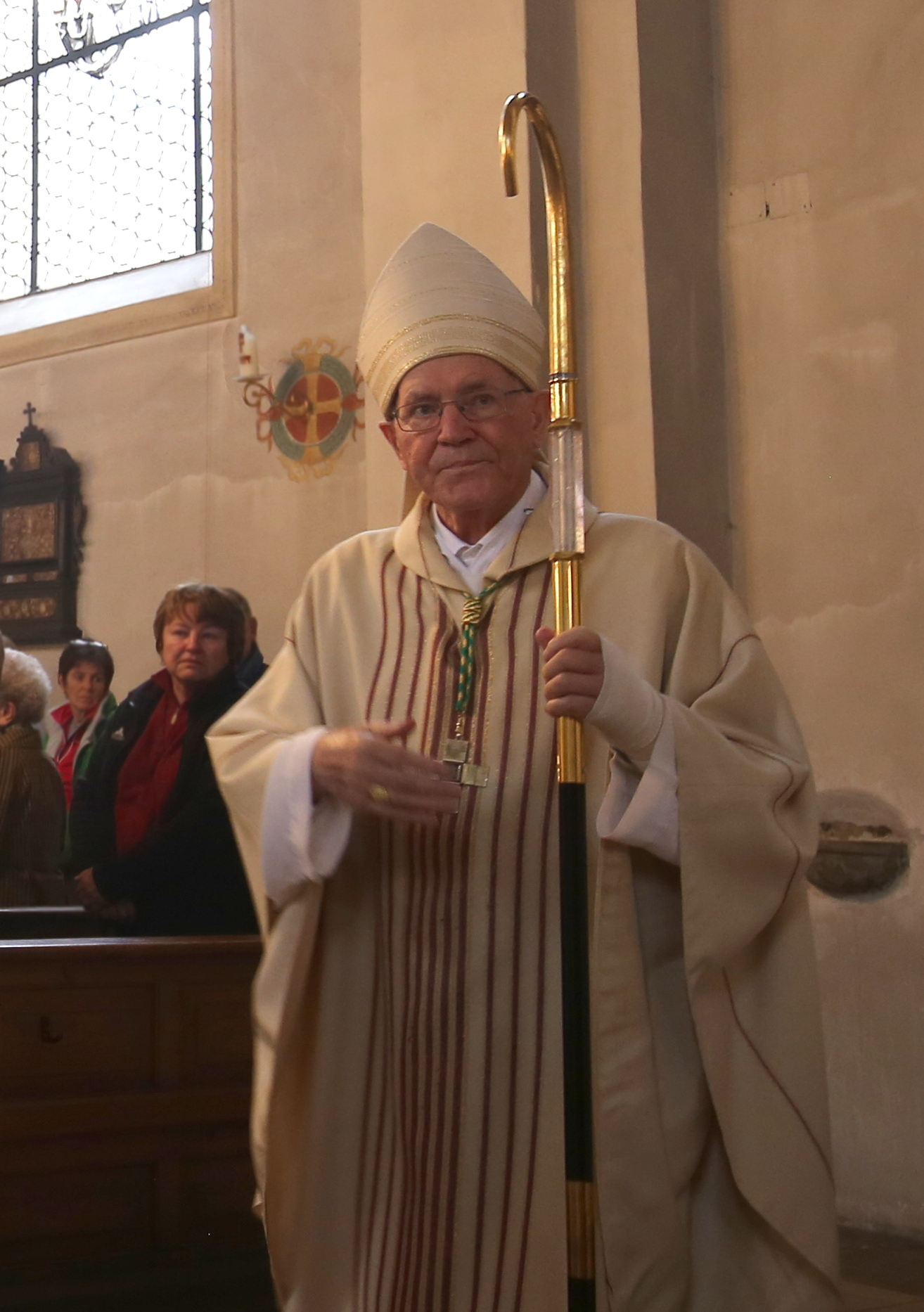 Flößerwallfahrt in Masia Thalkirchen am 2018-09-02 mit Weihbischof Emeritus Franz Dietl.